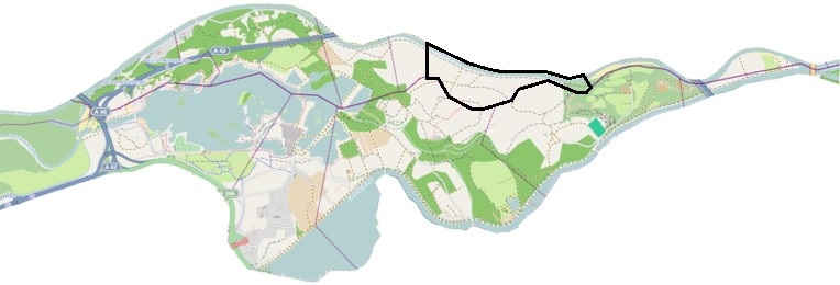 Territoire de Thil : géolocalisation Grand Parc de Miribel-Jonage.